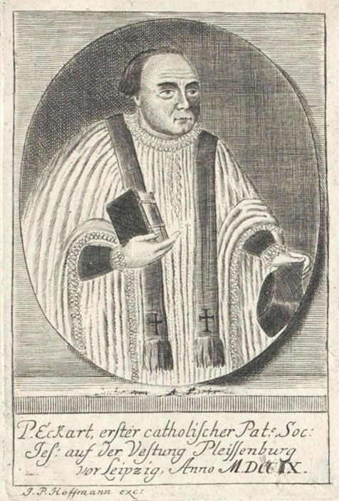 Heinrich Eggerth (auch Eckart), Jesuit, erster nachreformatorischer katholischer Seelsorger in Leipzig, auf der Festung Pleißenburg